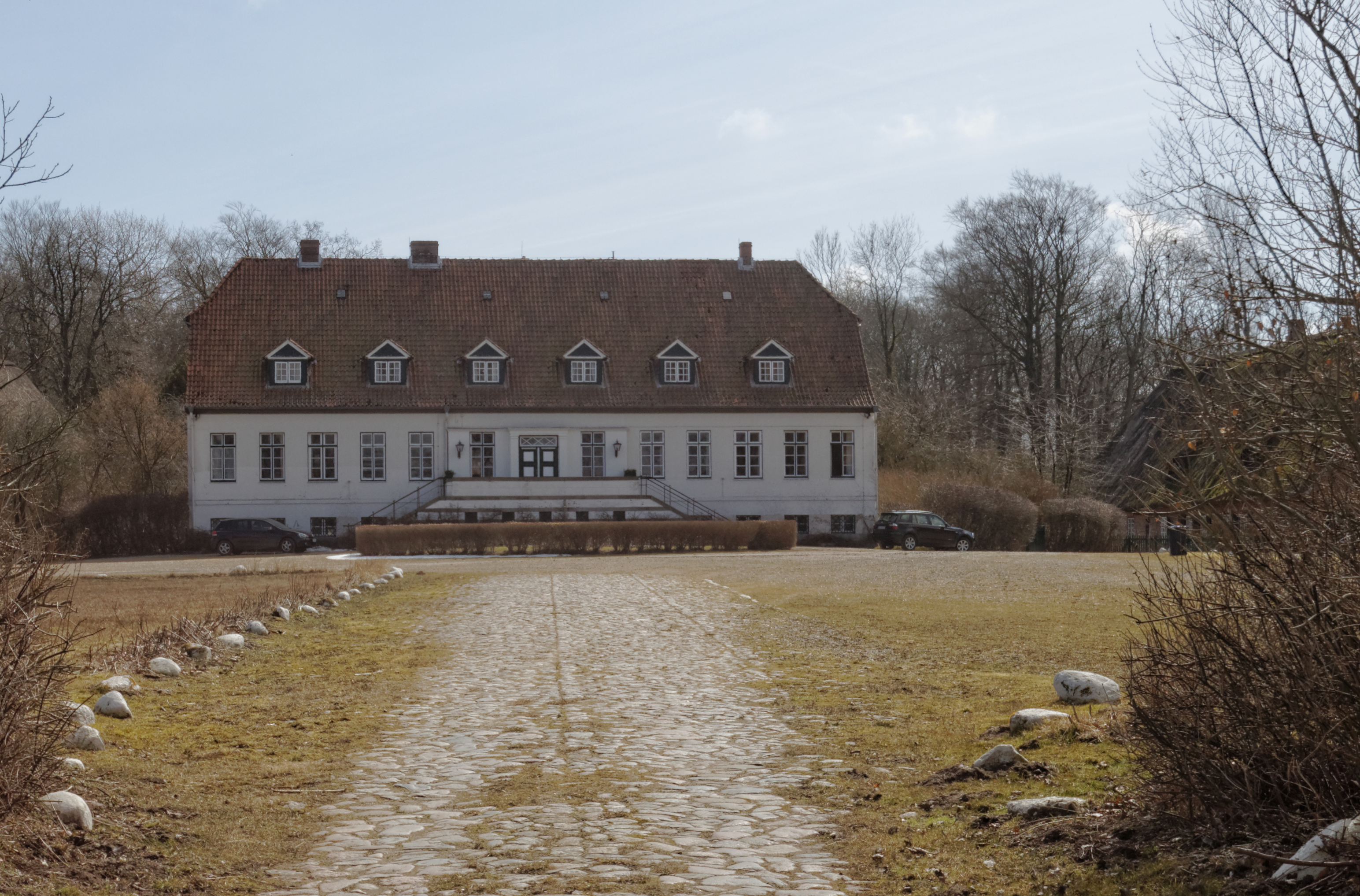 Thumby, Gut Bienebek; Herrenhaus